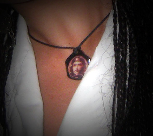 Pendiente con la cara de Che